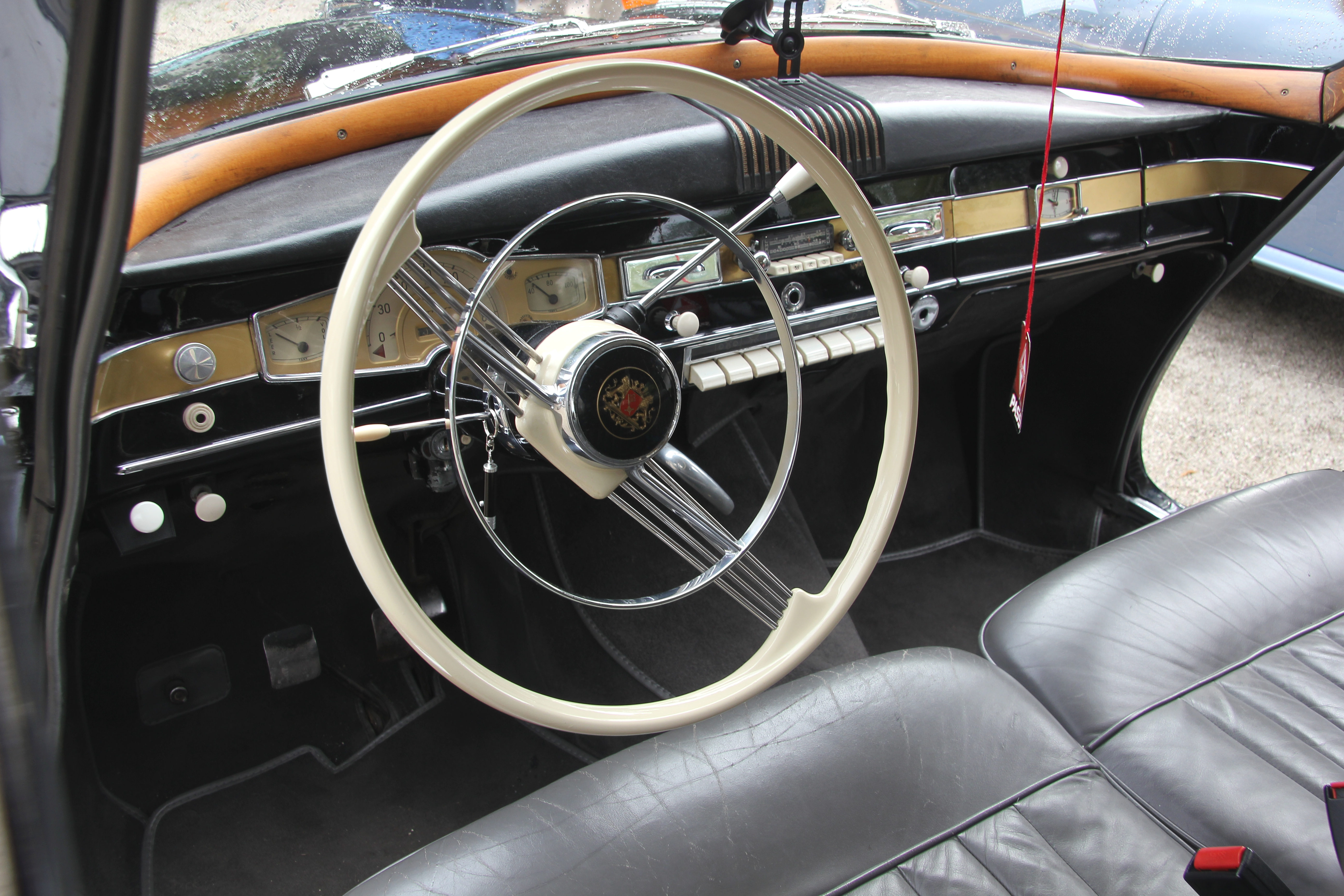 Borgward Hansa 2400 II, 345 Stück gebaut von 1955 bis 1958; Armaturenbrett nach der Modellpflege vom März 1957